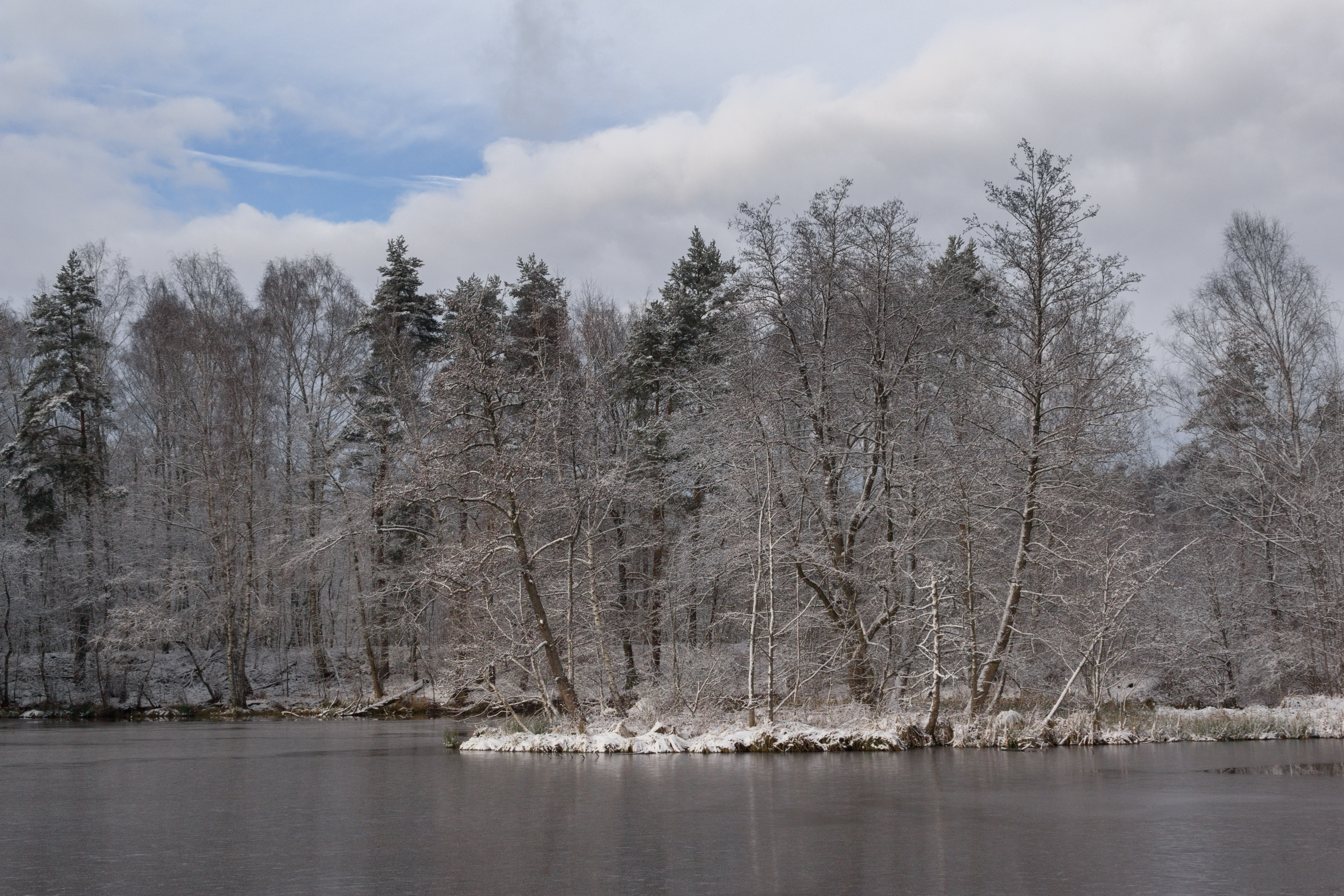 Krugsweiher, LSG Schutz des Landschaftsraumes im Gebiet des Landkreises Roth - "Südliches Mittelfränkisches Becken östlich der Schwäbischen Rezat und der Rednitz mit Vorland der Mittleren Frankenalb" (LSG Ost), Feucht